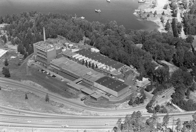 AB Wårby Bryggerier, förvärvat 1989 av Spendrups Bryggeri AB. Motiv: AB Wårby Bryggerier Nyckelord: Flygbilder Kategori: Prod livsmedel AB Wårby Bryggerier, förvärvat 1989 av Spendrups Bryggeri AB.